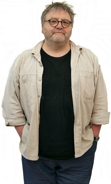 Portraitfoto Karl Krüll